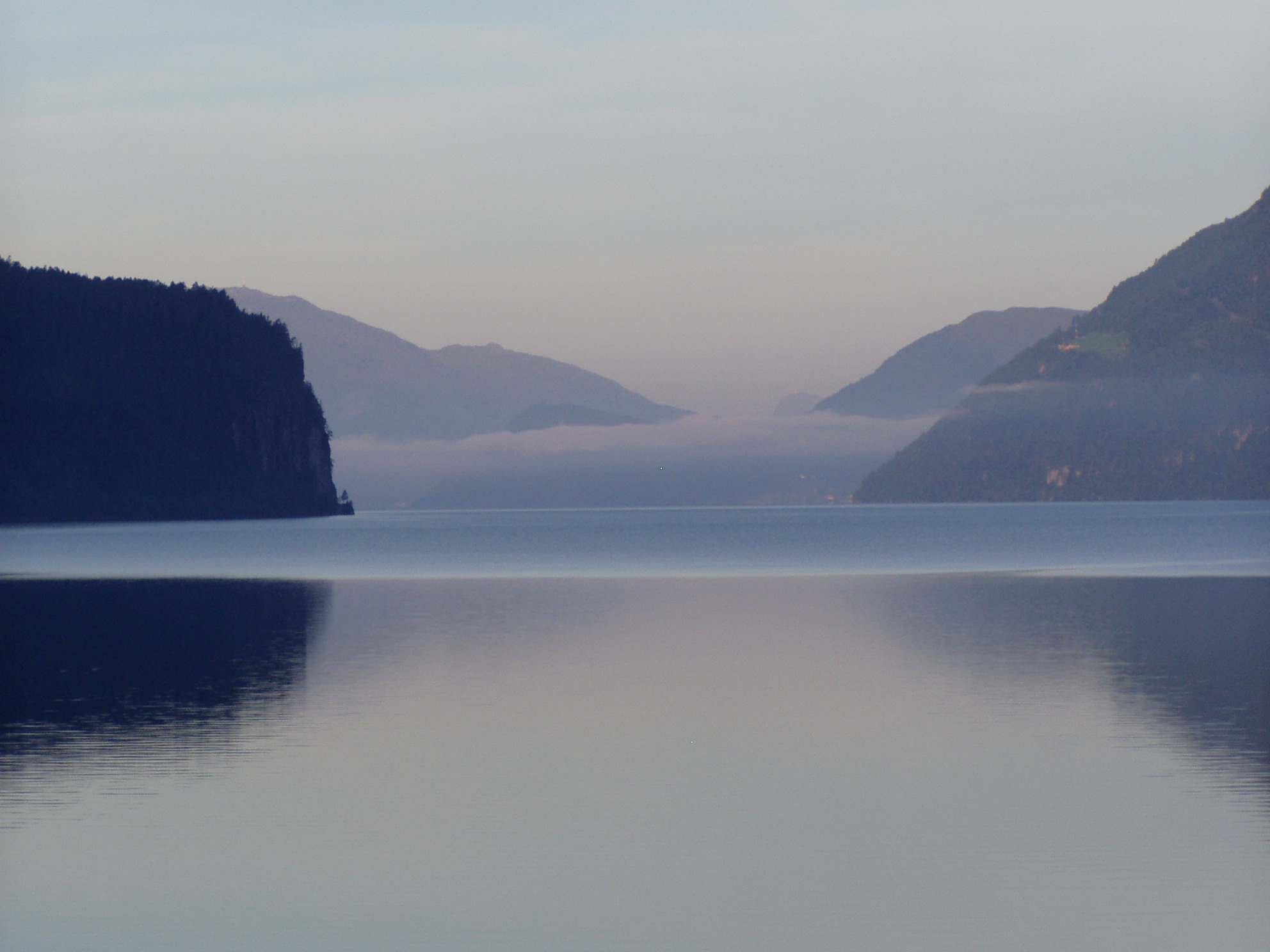 zicht op het meer in Hornindal